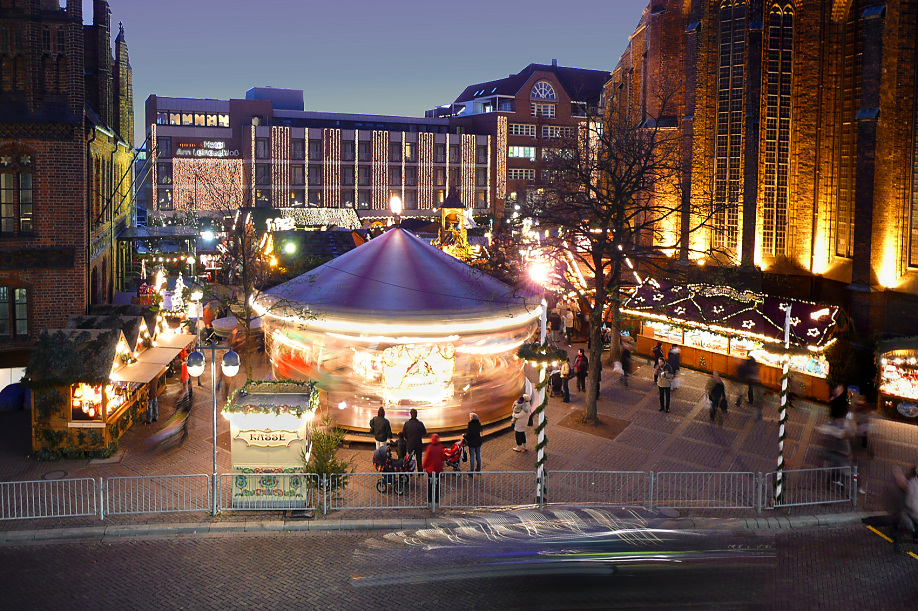 Weihnachtsmarkt Hannover